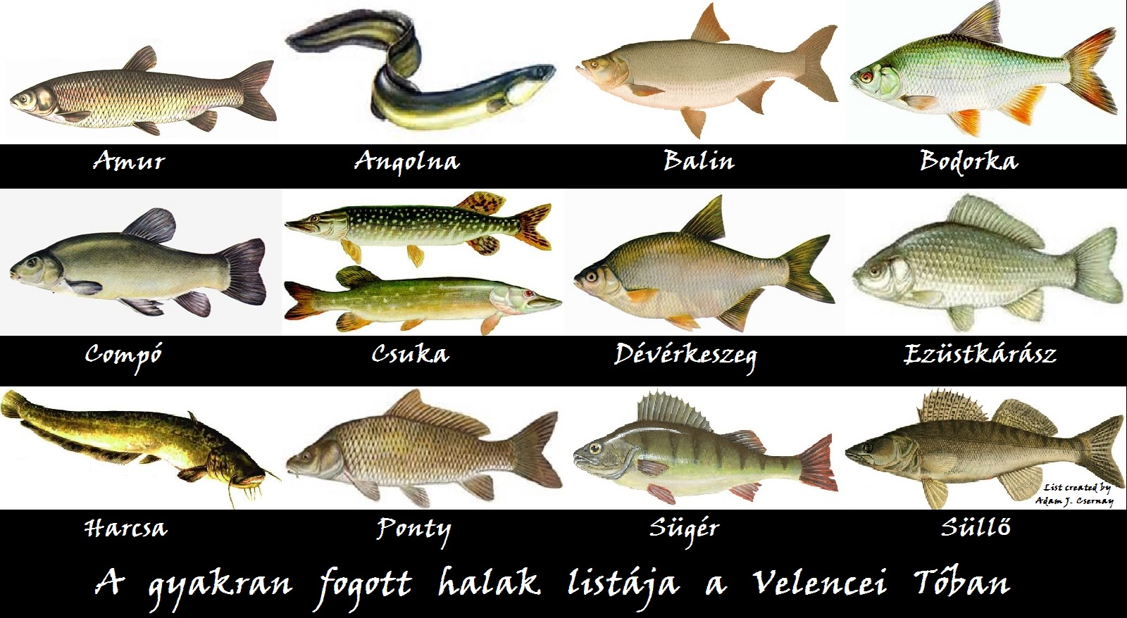 Ezek a halak amiket leggyakrabban fognak a Velence vizeben.